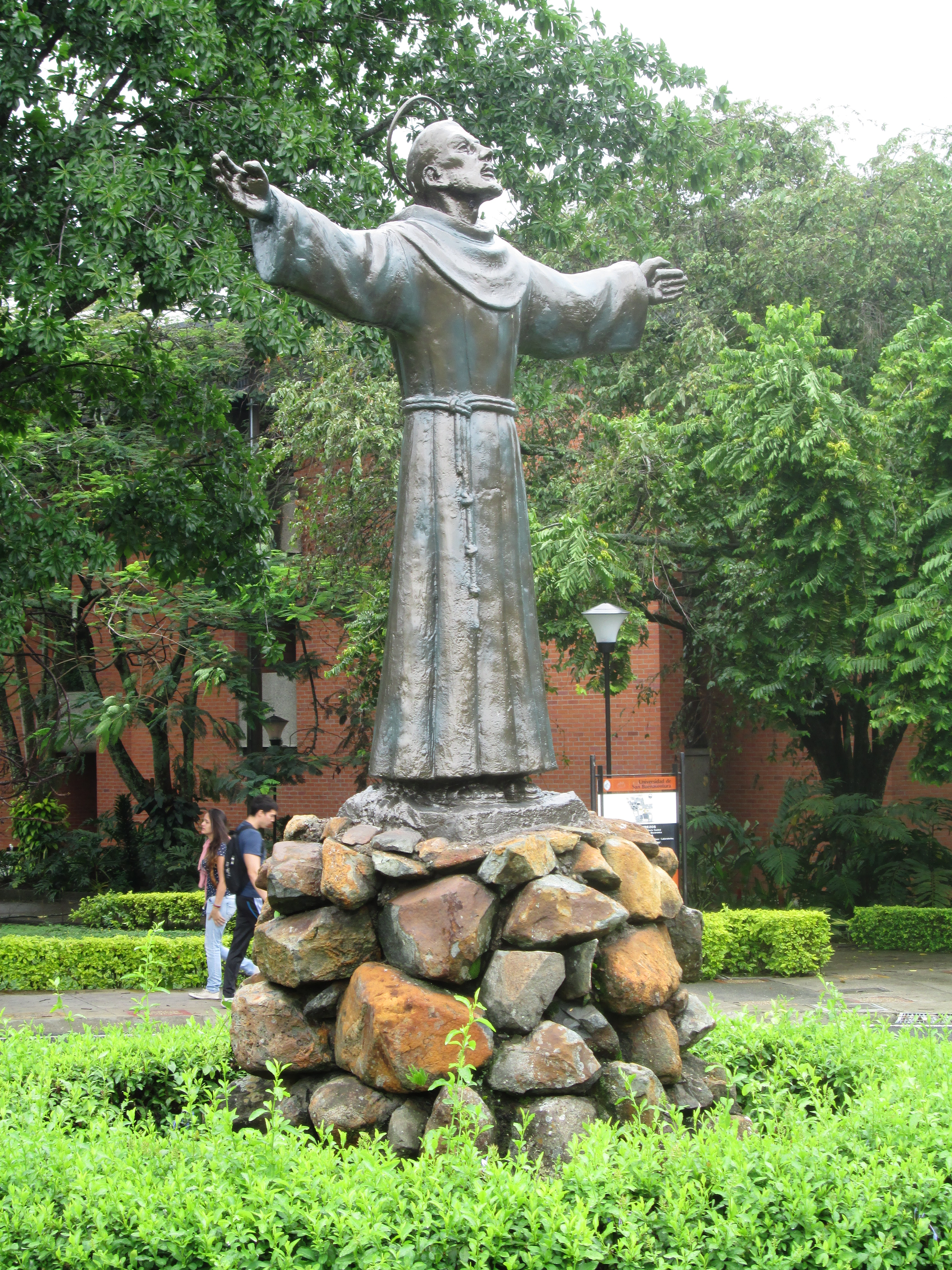 Estatua de San Francisco en el campus de la universidad sede cali.